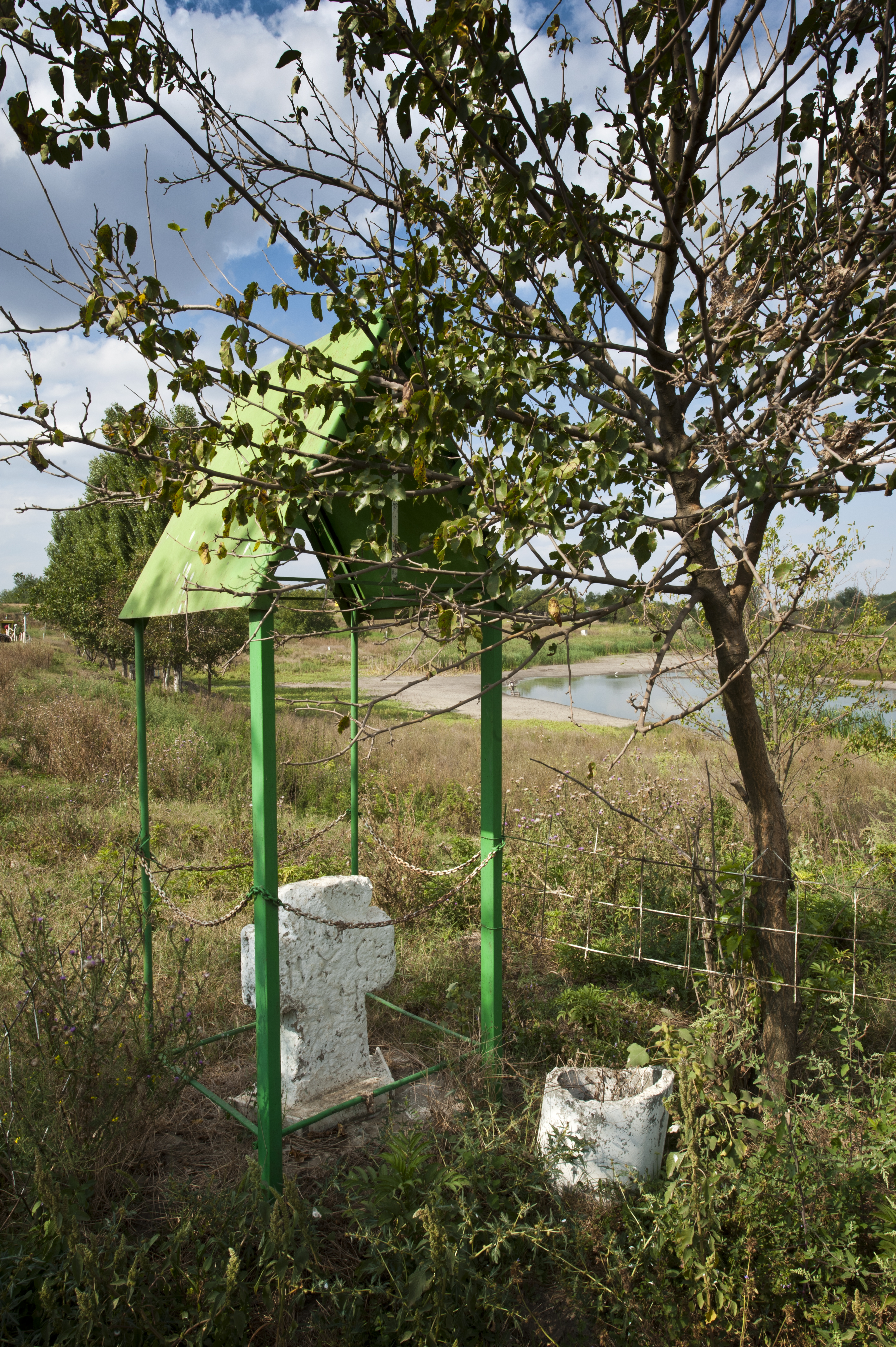 Cruce de hotar